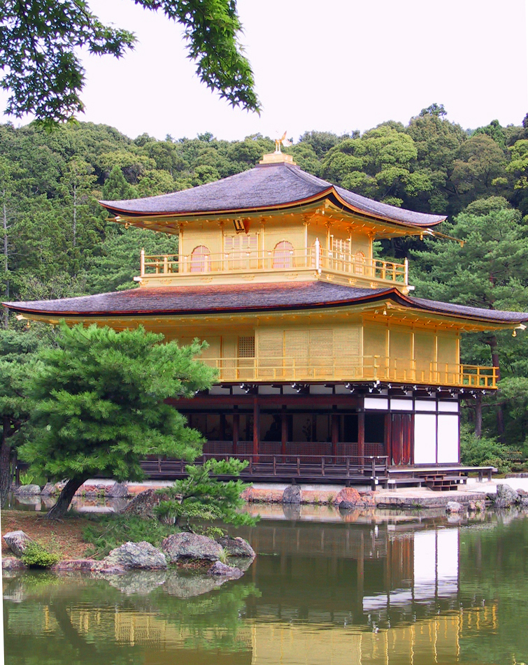 Kinkaku-ji Gold Pavilion in Kyoto, Japan; see also Image:Kinkaku-ji.jpg